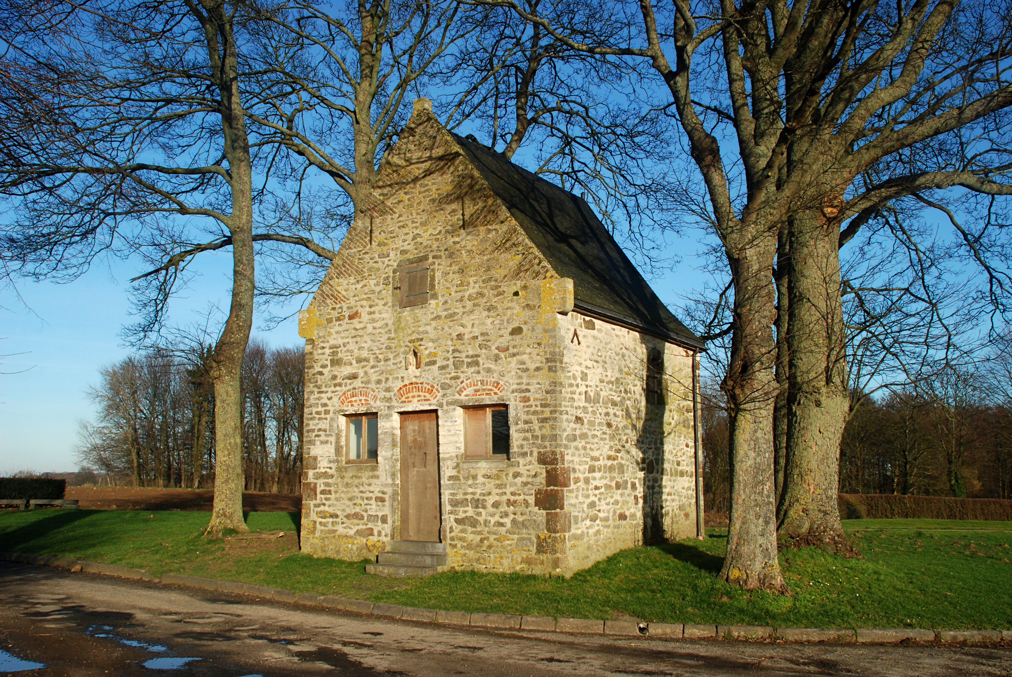 Belgique - Brabant wallon - Chaumont-Gistoux - Longueville - Chapelle du Chêneau